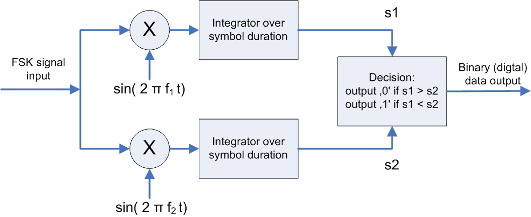 Coherent demodulator for binary FSK signals - kohärenter Demodulator für binäre FSK Signale.